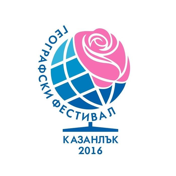 Лого на Български географски фестивал - Казанлък 2016